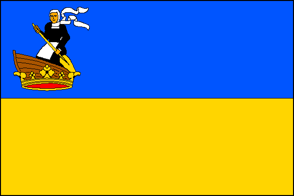 Chřibská vlajka